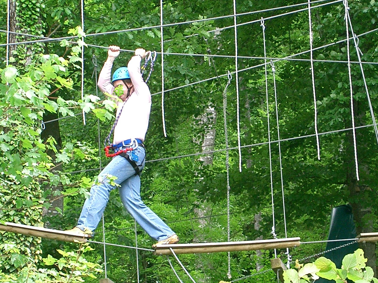 Parcours aventure en forêt self made PRA